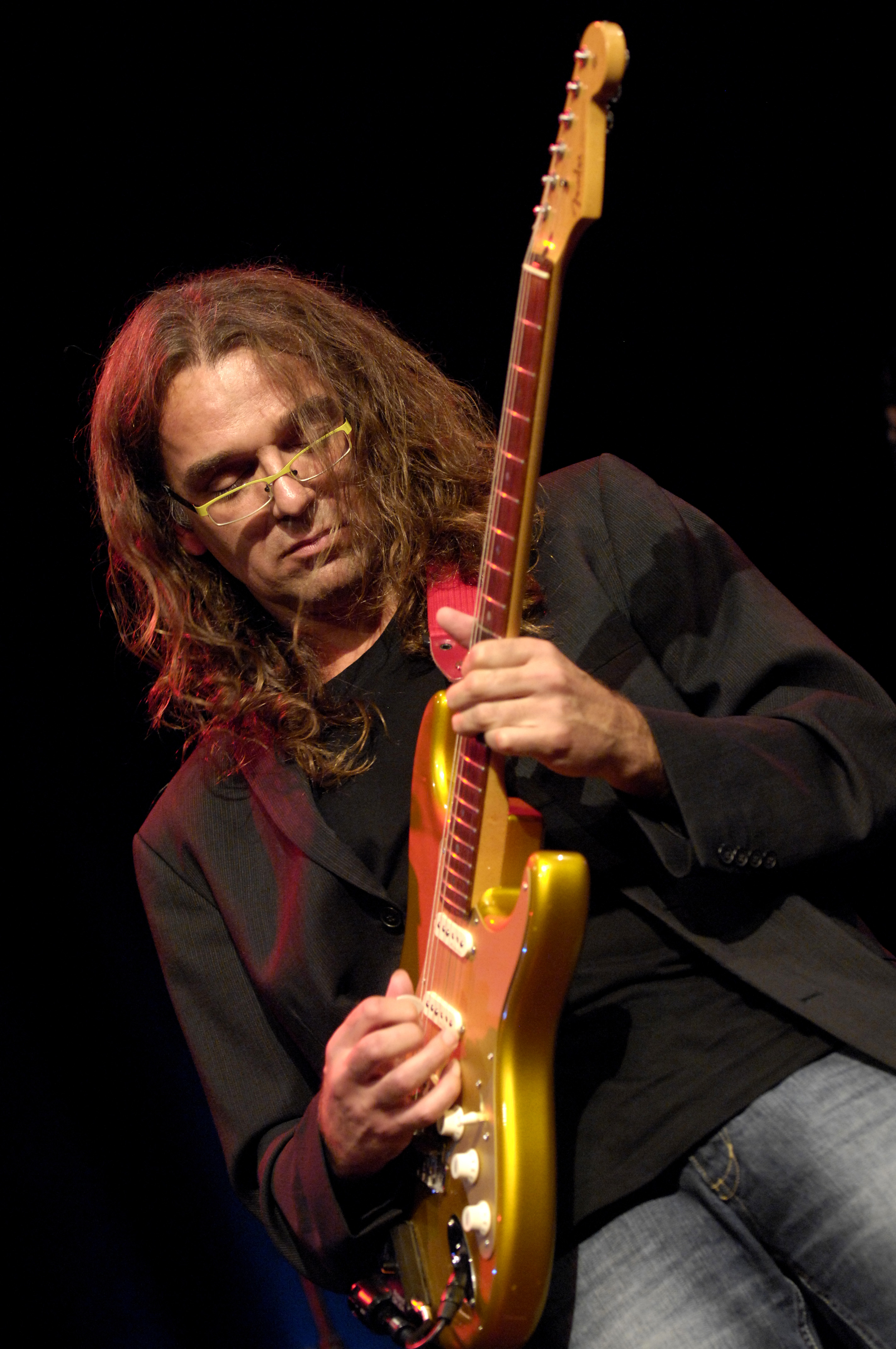 Peter Autschbach auf dem open-strings-Festival Osnabrück